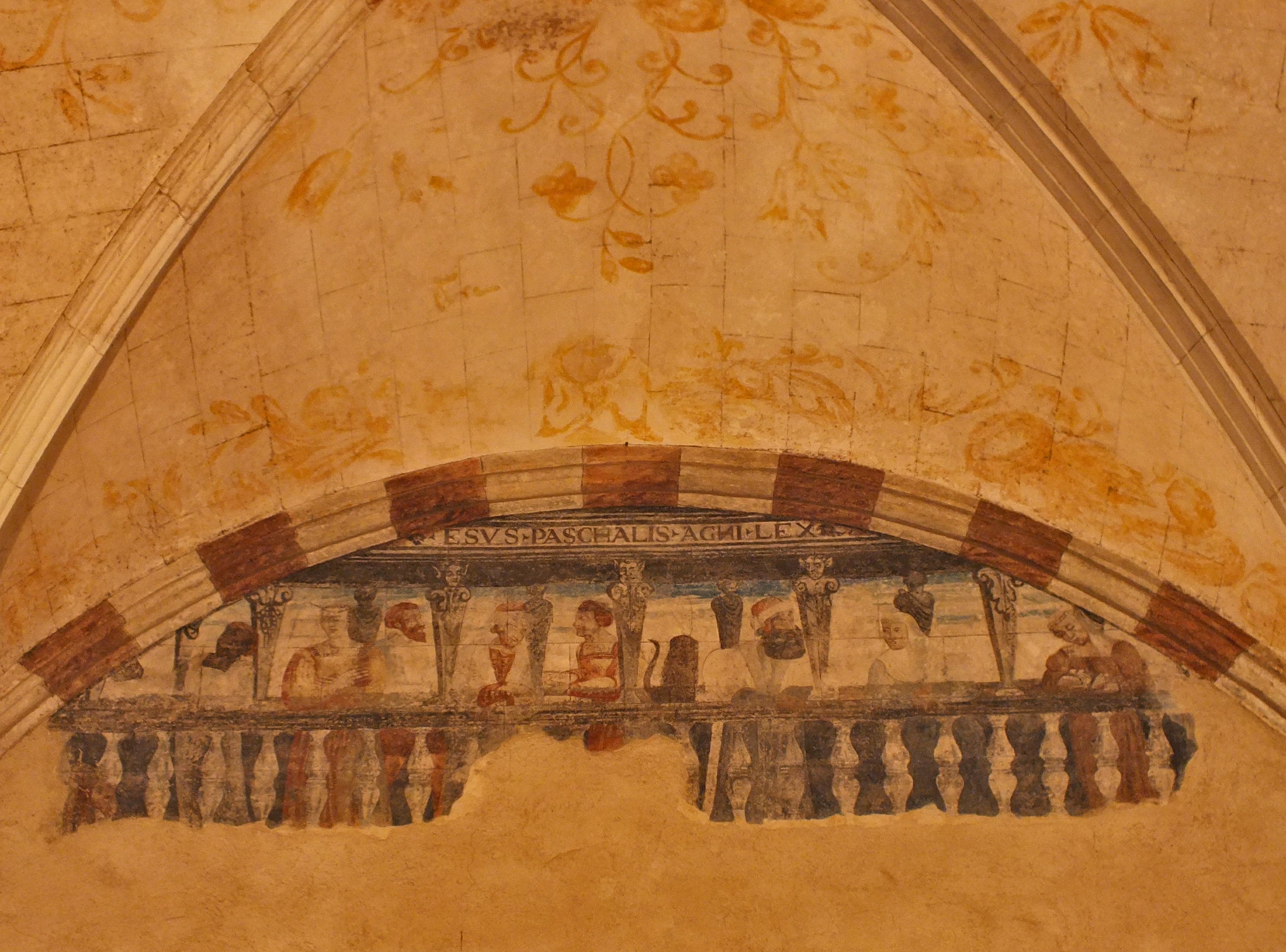 Sant Jeroni de la Murtra